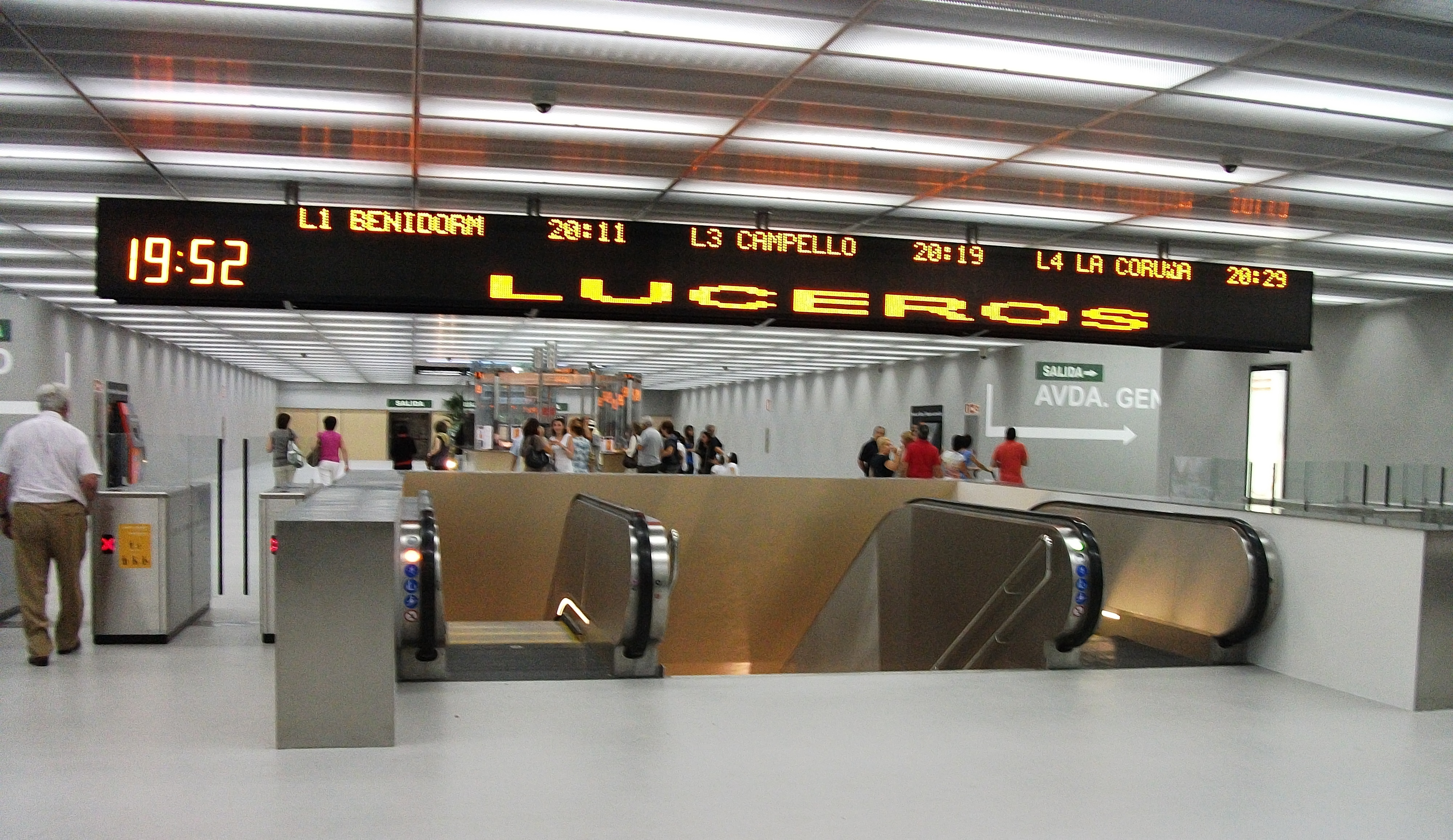 Estación de "Luceros", actual terminal de las lineas 1, 2, 3 y 4 en la ciudad de Alicante.